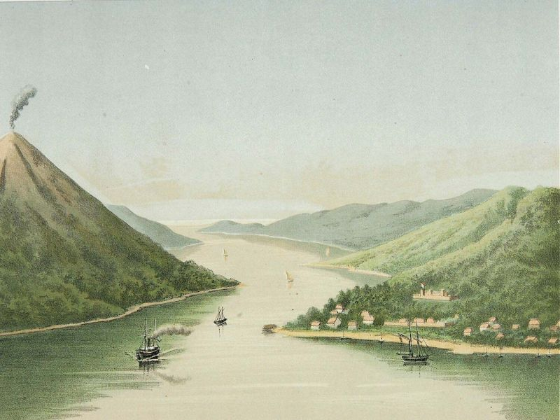 Litho. Litho naar een oorspronkelijke aquarel van Rappard. Veilige ligplaats voor schepen te Banda Neira